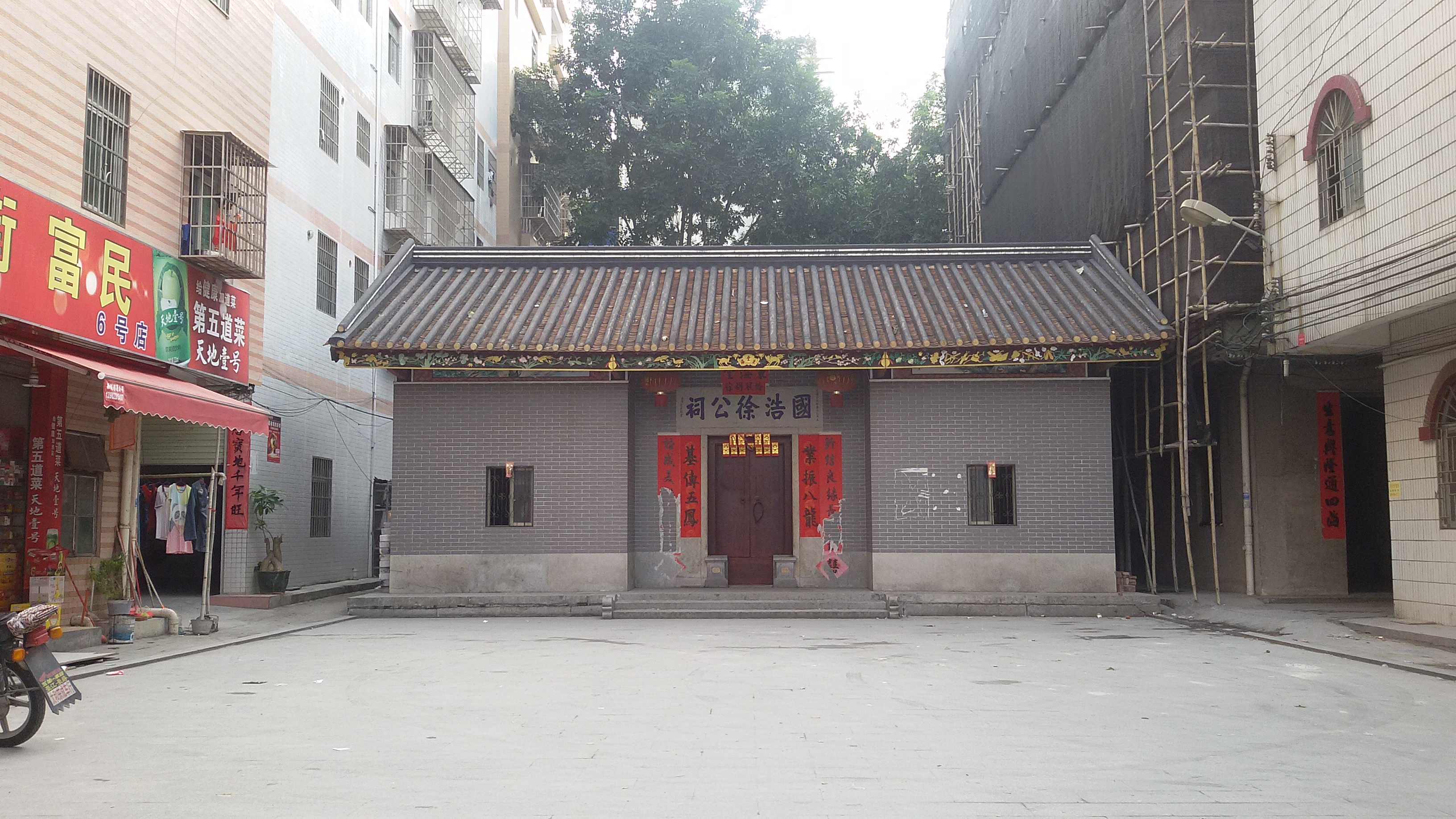 粵語: 國浩徐公祠